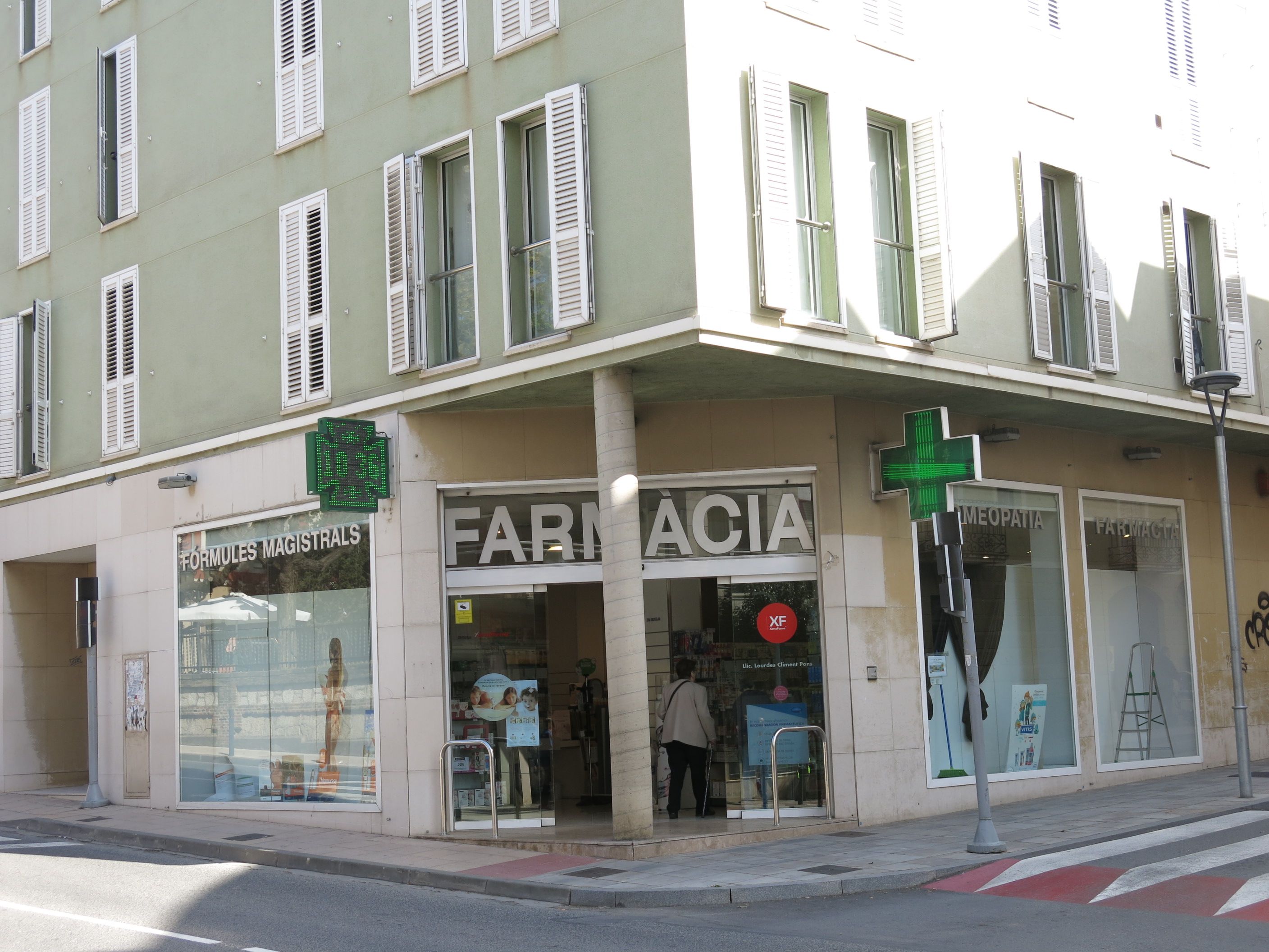 Antiga Farmàcia Anselm Clavé, 35 (Valls)